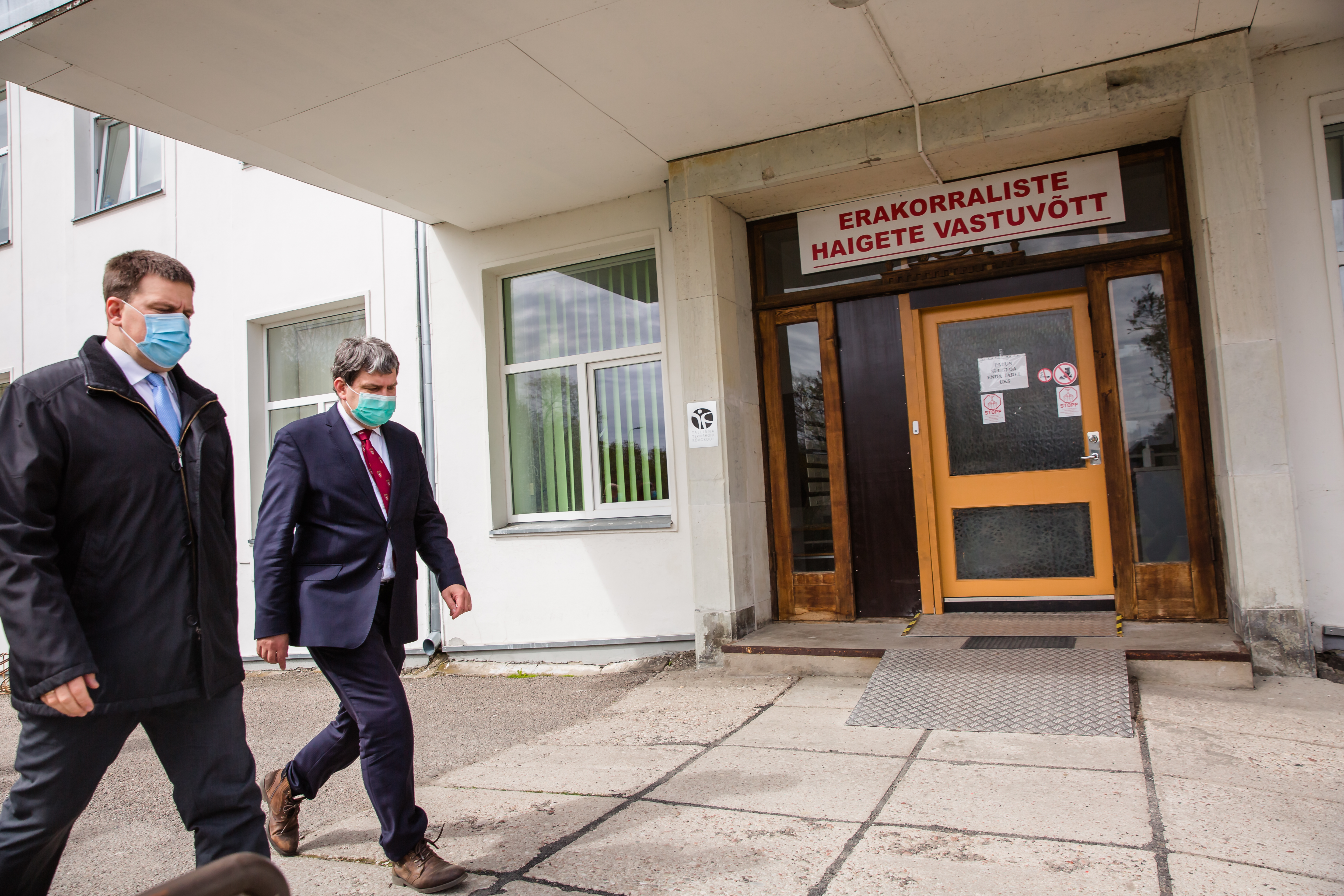 Jüri Ratase Muhu- ja Saaremaa visiit mais 2020.